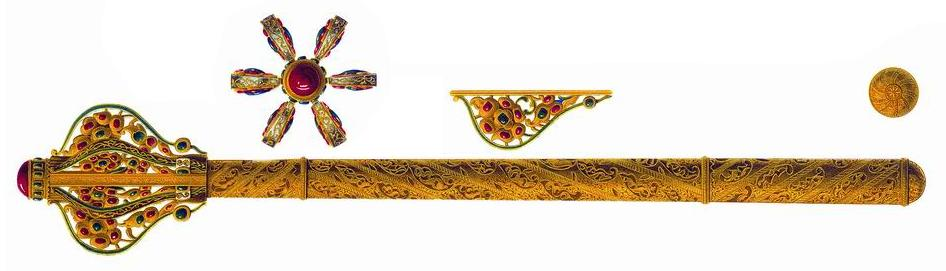 Шестопёр. Подарен Алексею Михаловичу в 1655. «Быздыган перья прорезные золотые с винивты, в главе яхонт червчет большой граненой, под ним десять изумрудов; в перье сто восемь яхонтов червчатых да тридцать шесть изумрудов; черен прорезной золот попорчен; исподняя трубка сходит; по ярлыку написан тот быздыган шестопером; челом ударил Великому Государю тем быздыганом Греченин Дмитрей Остафьев по рk`г году, июля в к`з день. А по нынешней переписи рч`є года и по осмотру, тот быздыган против прежних переписных книг сшолся; цена тому быздыгану шестьсот пятьдесят рублев, а по прежней описной книге написан вторым».